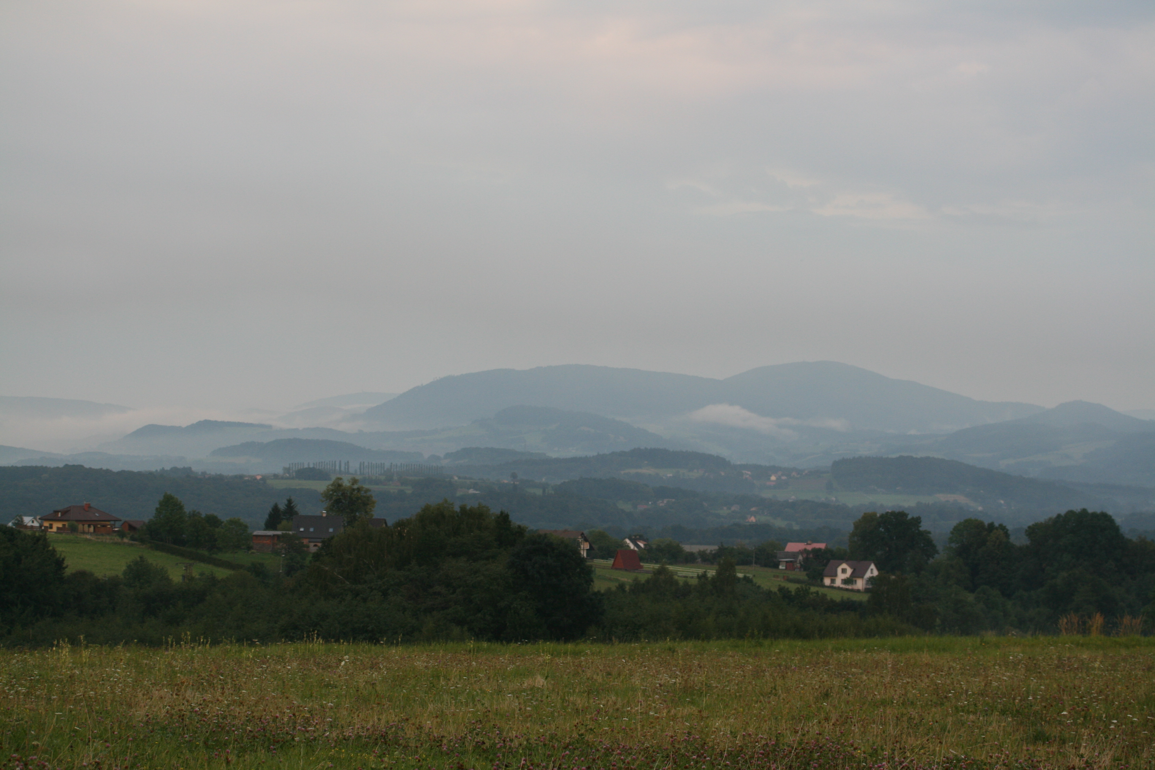 Dolní Žukov -předhůří Beskyd